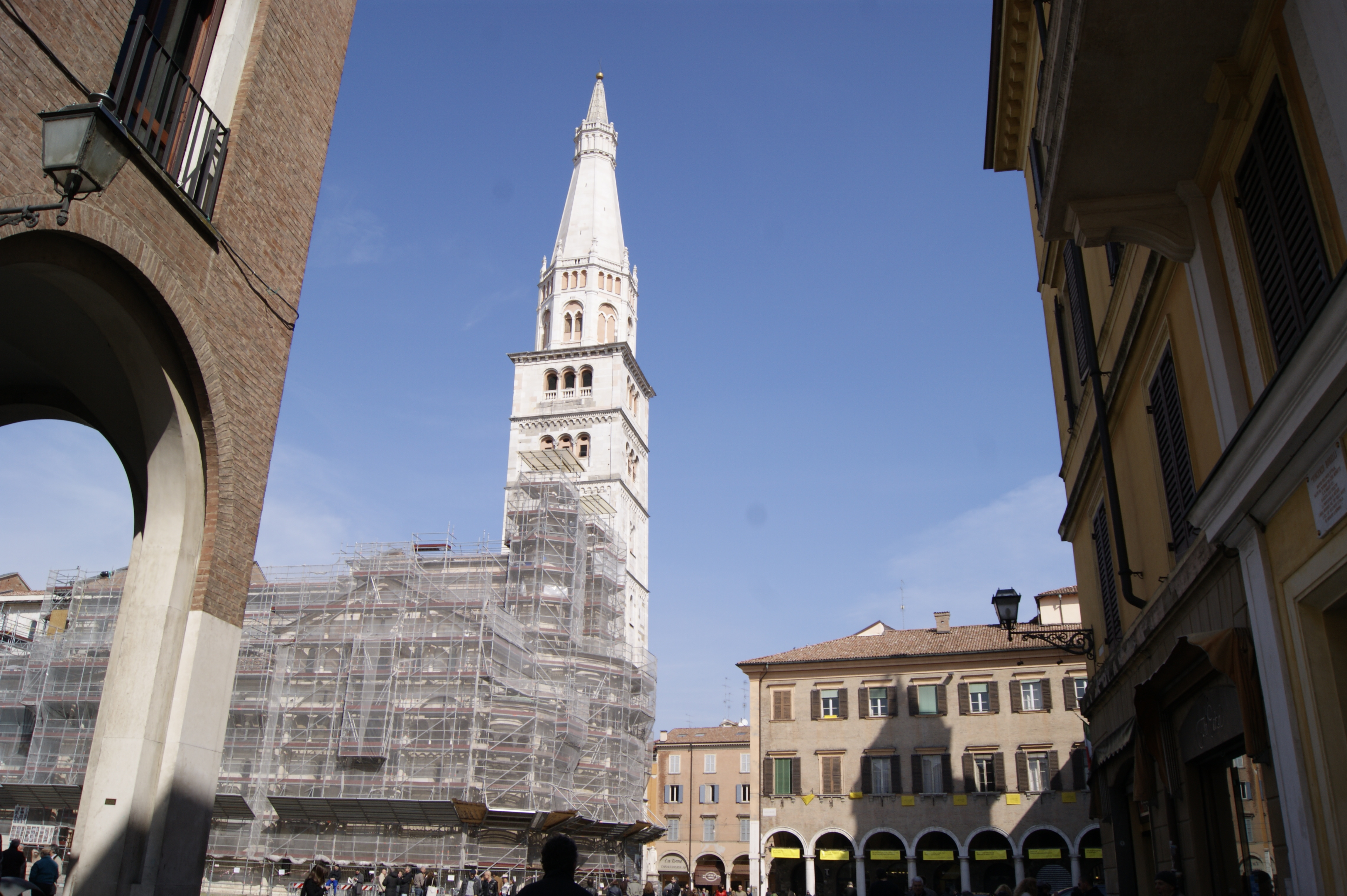 Torre Ghirlandina This is a photo of a monument which is part of cultural heritage of Italy.